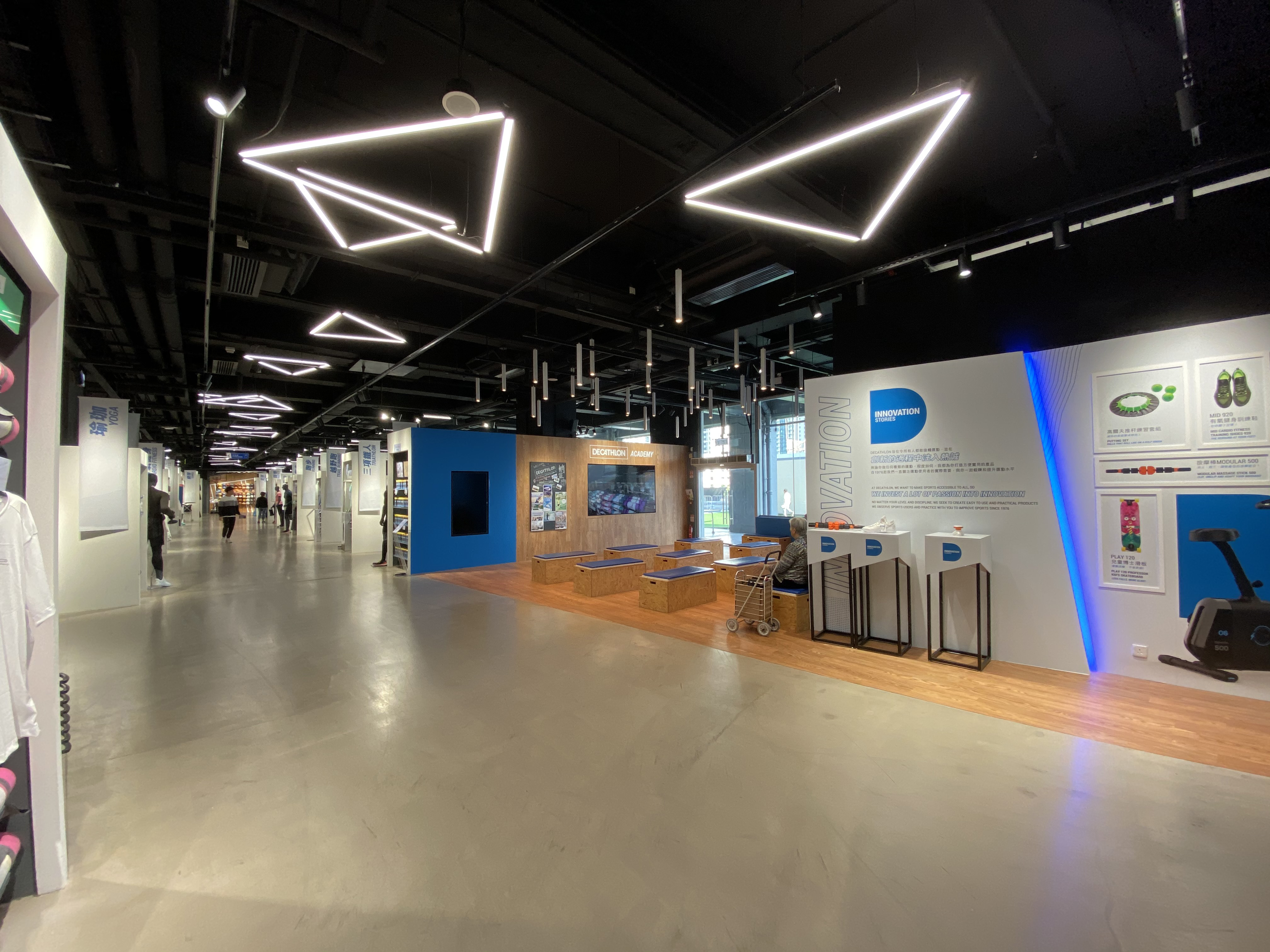 Sheung Tak Plaza Level 3 DECATHLON